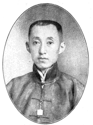 中文（台灣）: 中華民國國會議員